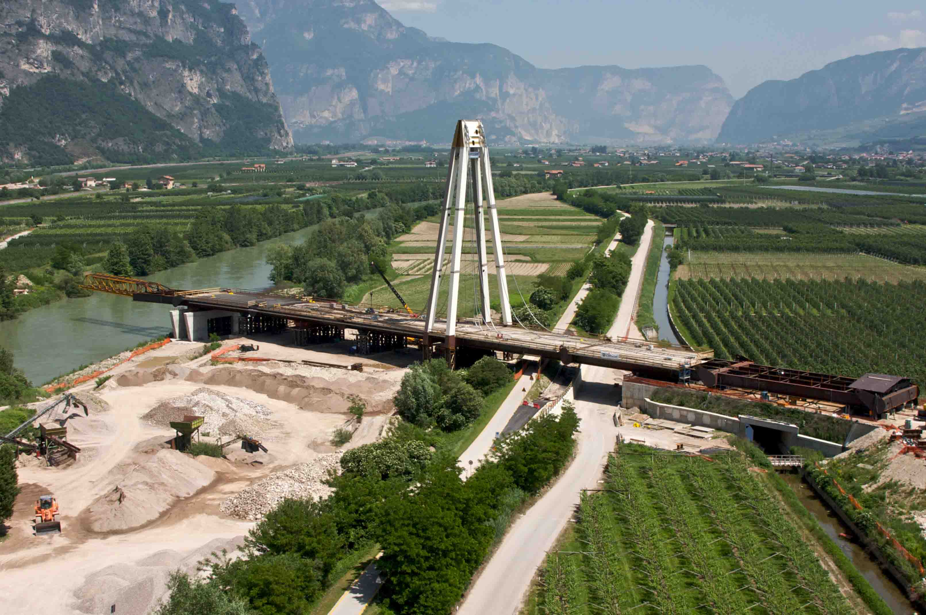 Ponte Adige in costruzine